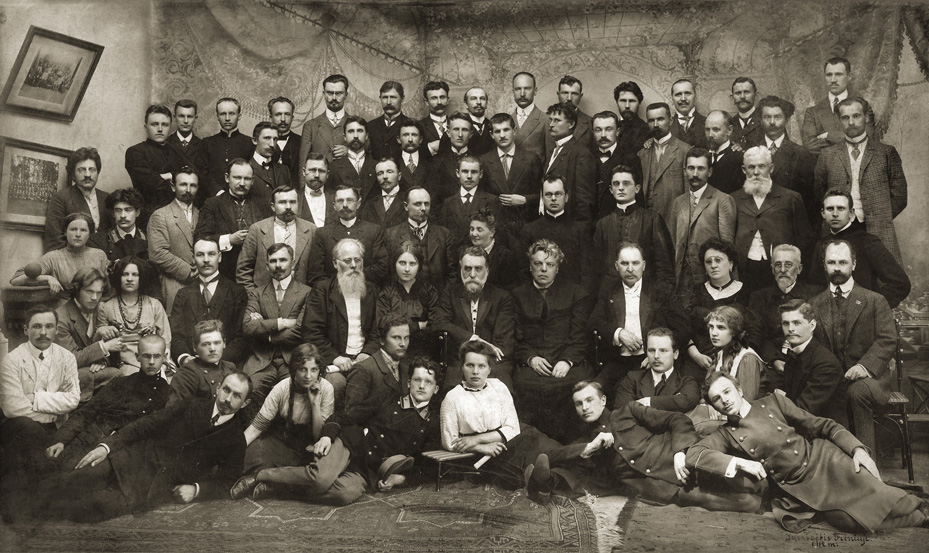 Lietuvių mokslo draugijos suvaziavimas. Lithuanian scholarly assembly 1912. From left: in second row - first Stasys Šilingas, second Emilija Šilingienė, third Juozas Vokietaitis, fifth Gabrielius Landsbergis-Žemkalnis, sixth Sofija Kymantaitė-Čiurlionienė, seventh Jonas Basanavičius, eight Kazimieras Prapuolenis, ninth Antanas Vileišis, tenth Emilija Vileišienė, twelfth Donatas Malinauskas; in third row - fifth Martynas Yčas, eight L. Didžiulienė, tenth Fabijonas Kemėšis; from right in fourth row - Mykolas Šleževičius, sixth Kazys Grinius; in fifth row - third J. Vileišis, Antanas Žmuidzinavičius.